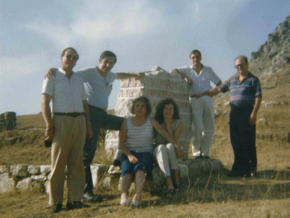 Gryka e Spartavet/Purtelja e Jinestrës (Hora e Arbëreshëvet 1989), përfaqësuesit e komunitetet Arbëreshe të Pulias, Bazilikatës dhe Sicilisë (Marjo Massaro, Zef Beccia, Mëria Tereza Massaro, Donato M. Mazzeo me poetin Zef Skirò Di Maxho. Nga arkivi "Basilicata Arbëreshe").